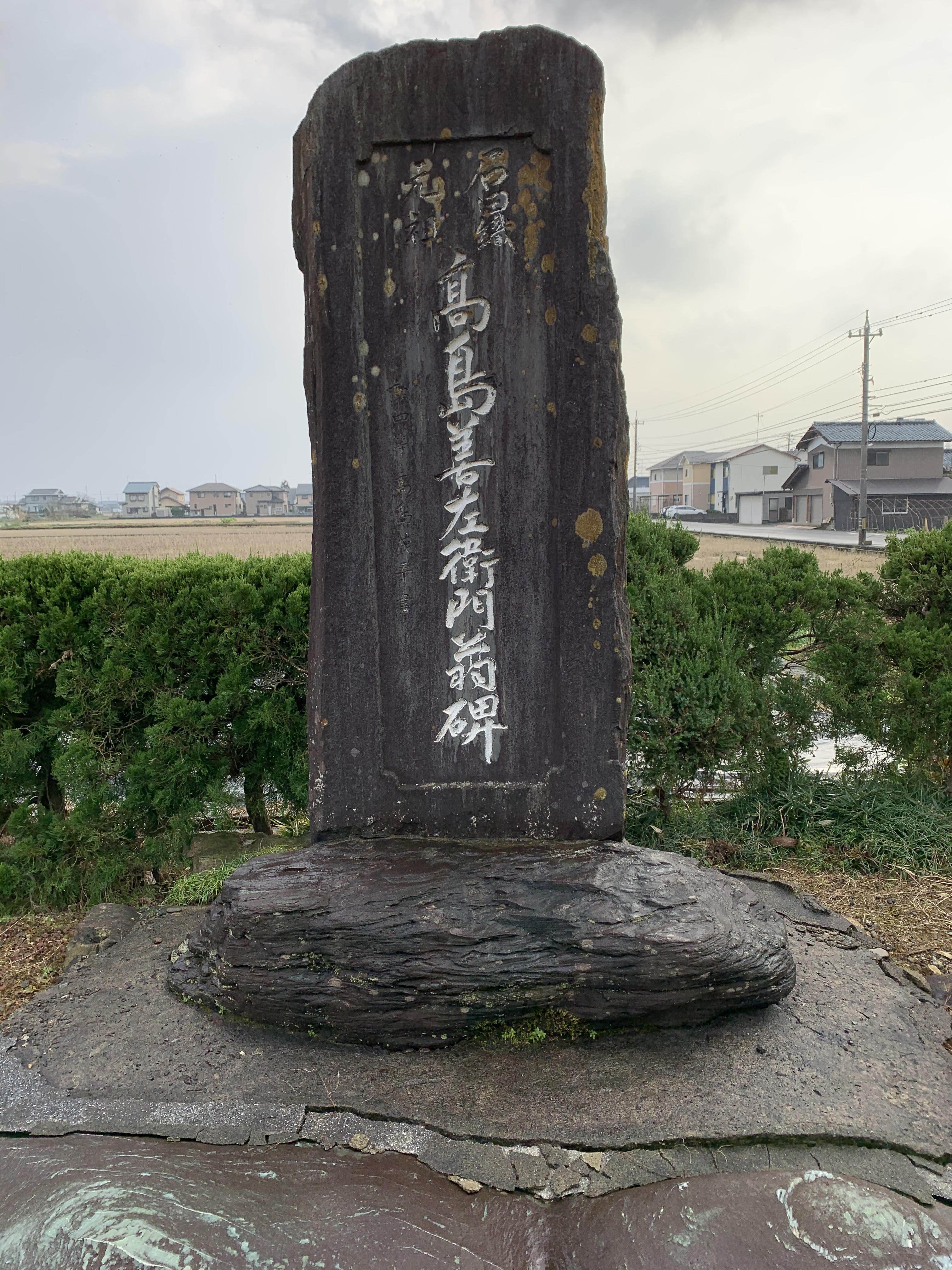 石田縞の祖高島善左衛門の石碑